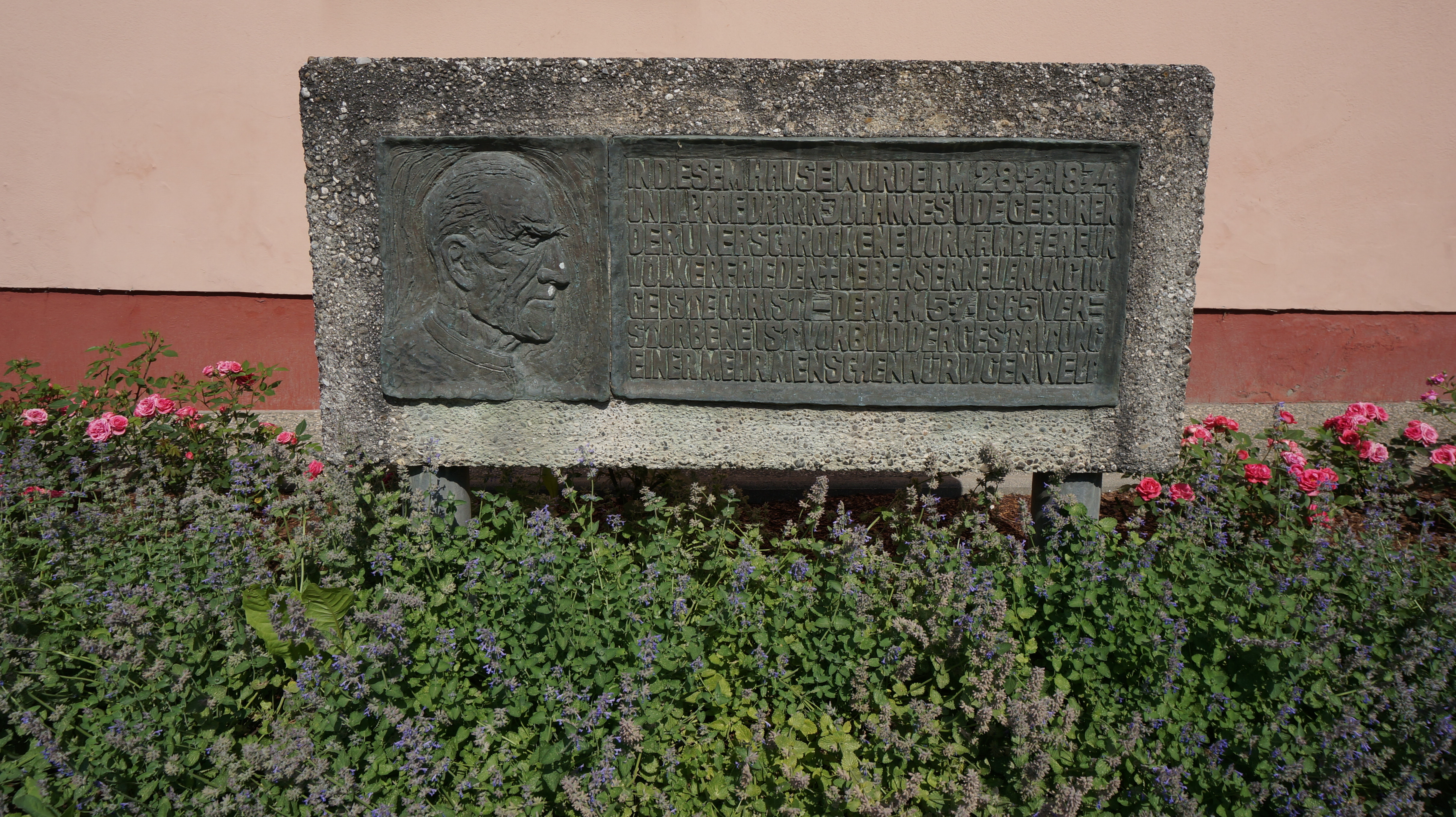 Gedenkstein Univ. Prof. Dr. Johannes Ude, geboren am 28.02.1874 beim Gemeindeamt in Sankt Kanzian am Klopeinersee, Bezirk Völkermarkt, Kärnten, Österreich, Europäische Union